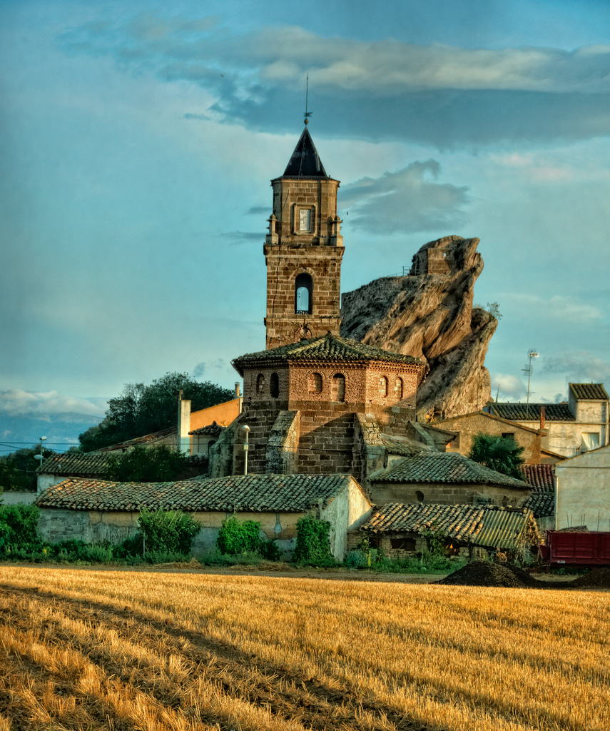 Azara